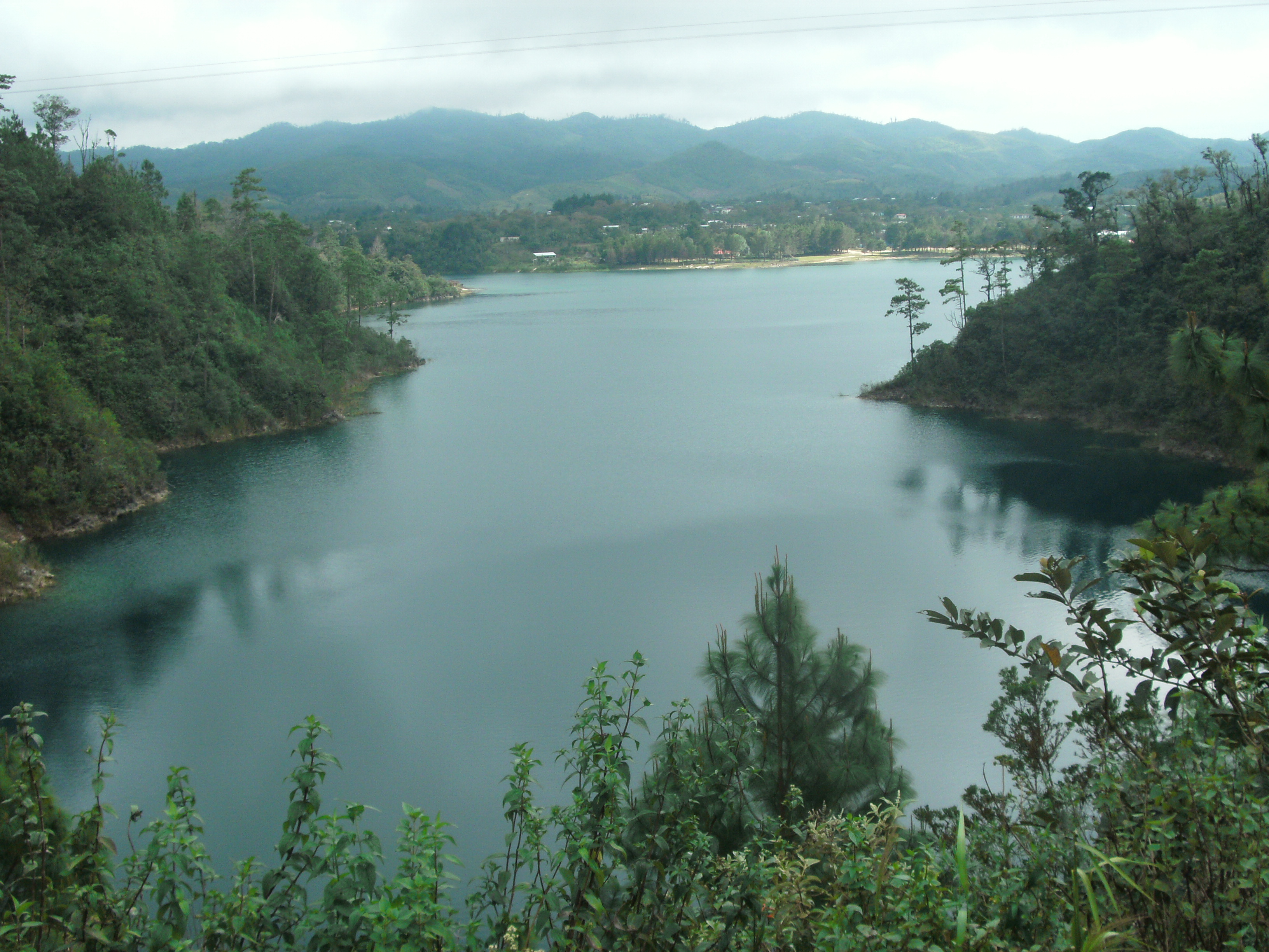 Lagunas de Montabello